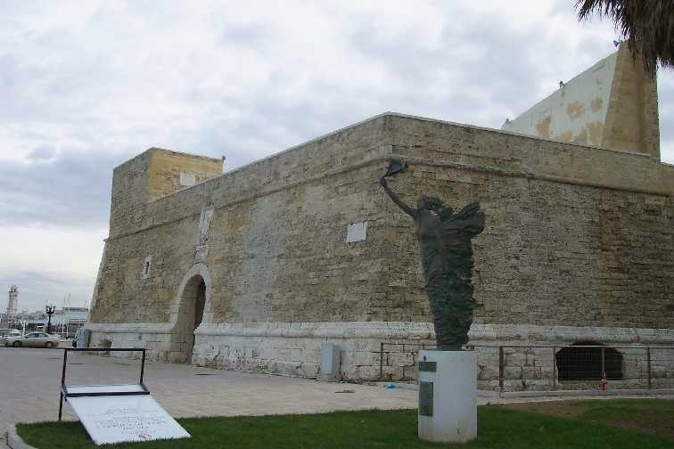 Bari - Città Vecchia - Fortino S. Antonio Foto di Marco De Candia Image:Bari - Fortino S.jpg